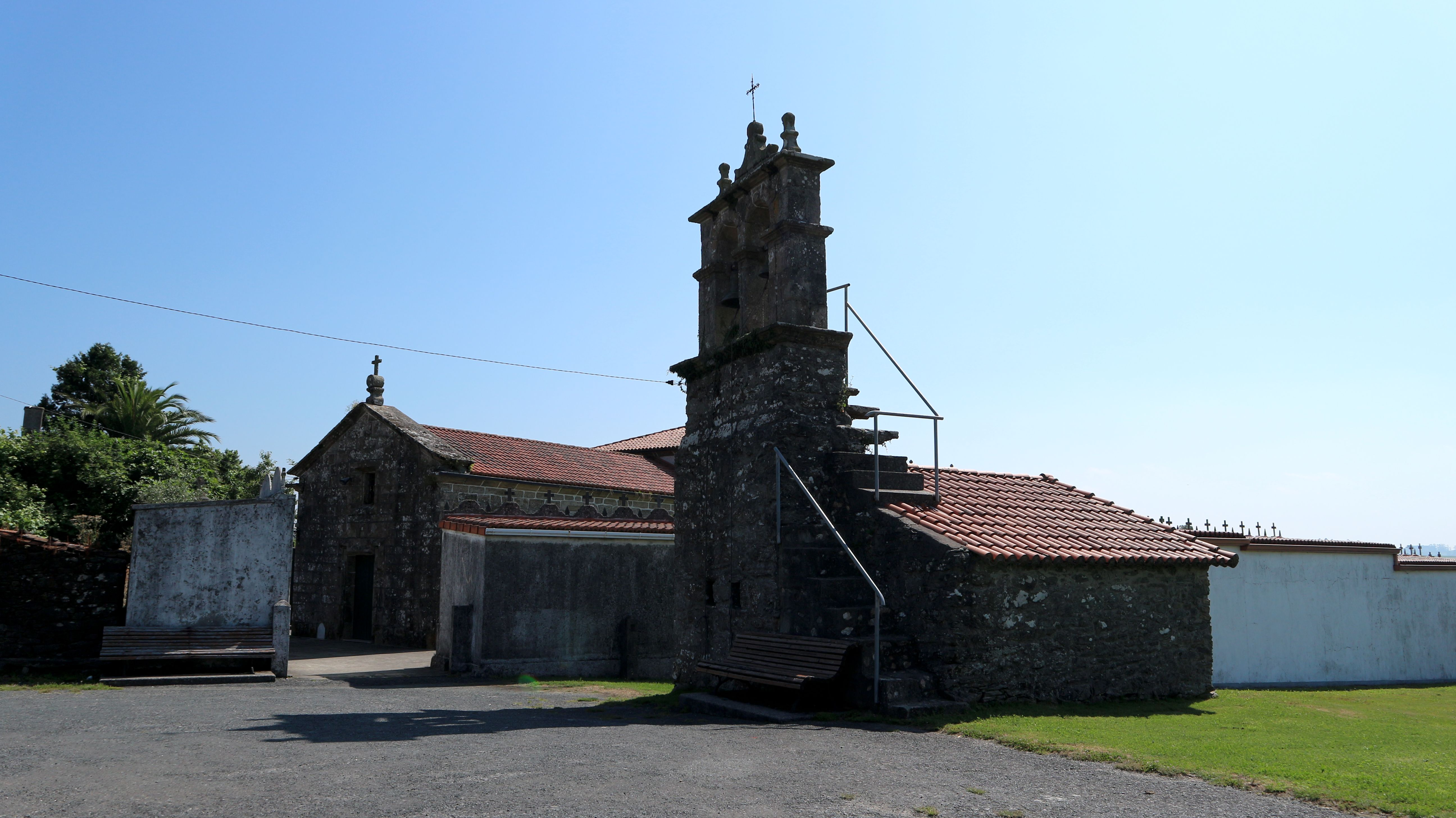 Igrexa de Santiago de Vilamaior, coa expadana exenta á fronte. Vilamaior, Ordes.